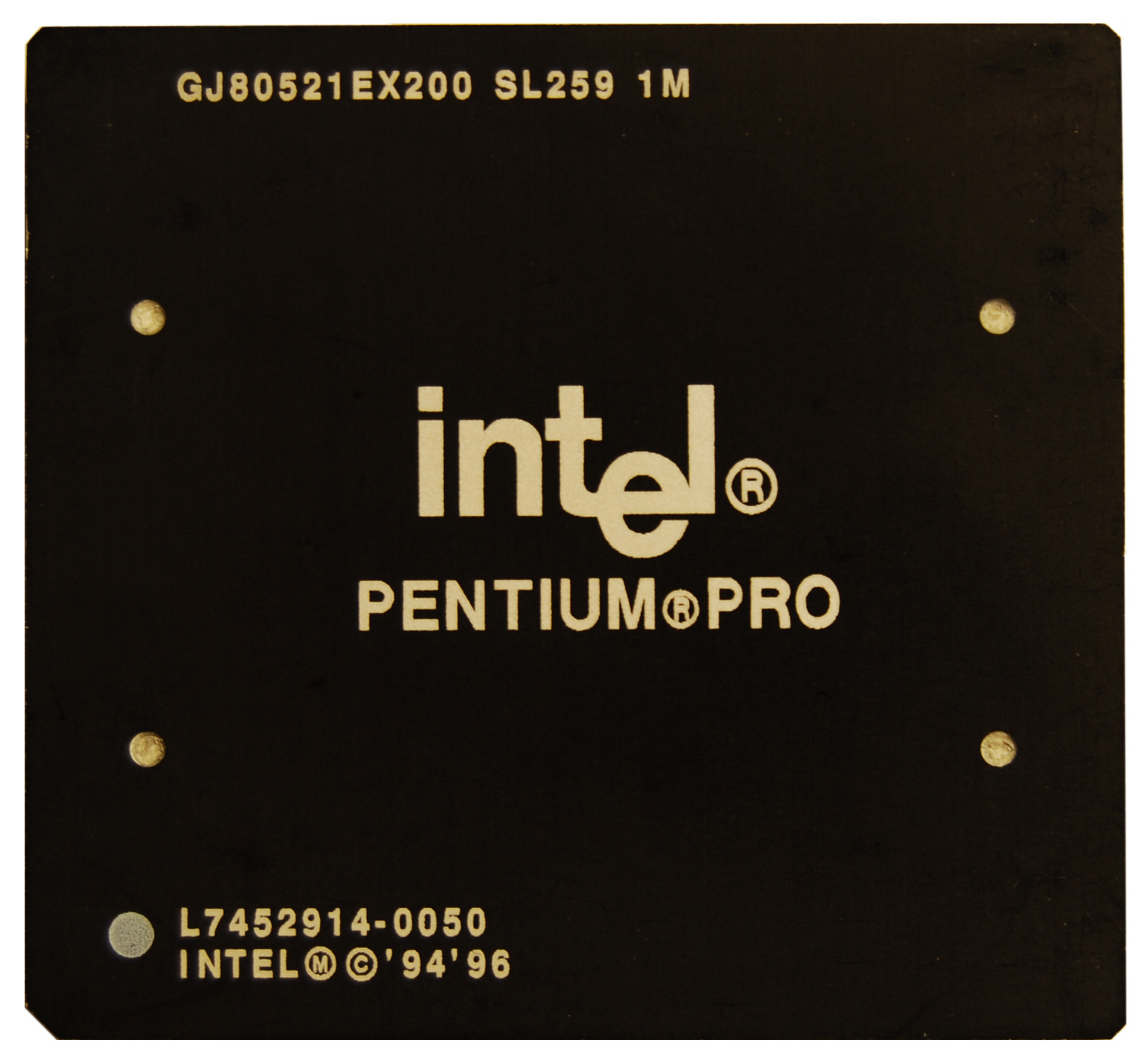 Front side of an Pentium Pro Black Edition